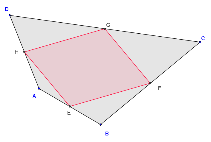 varignon parallelogram